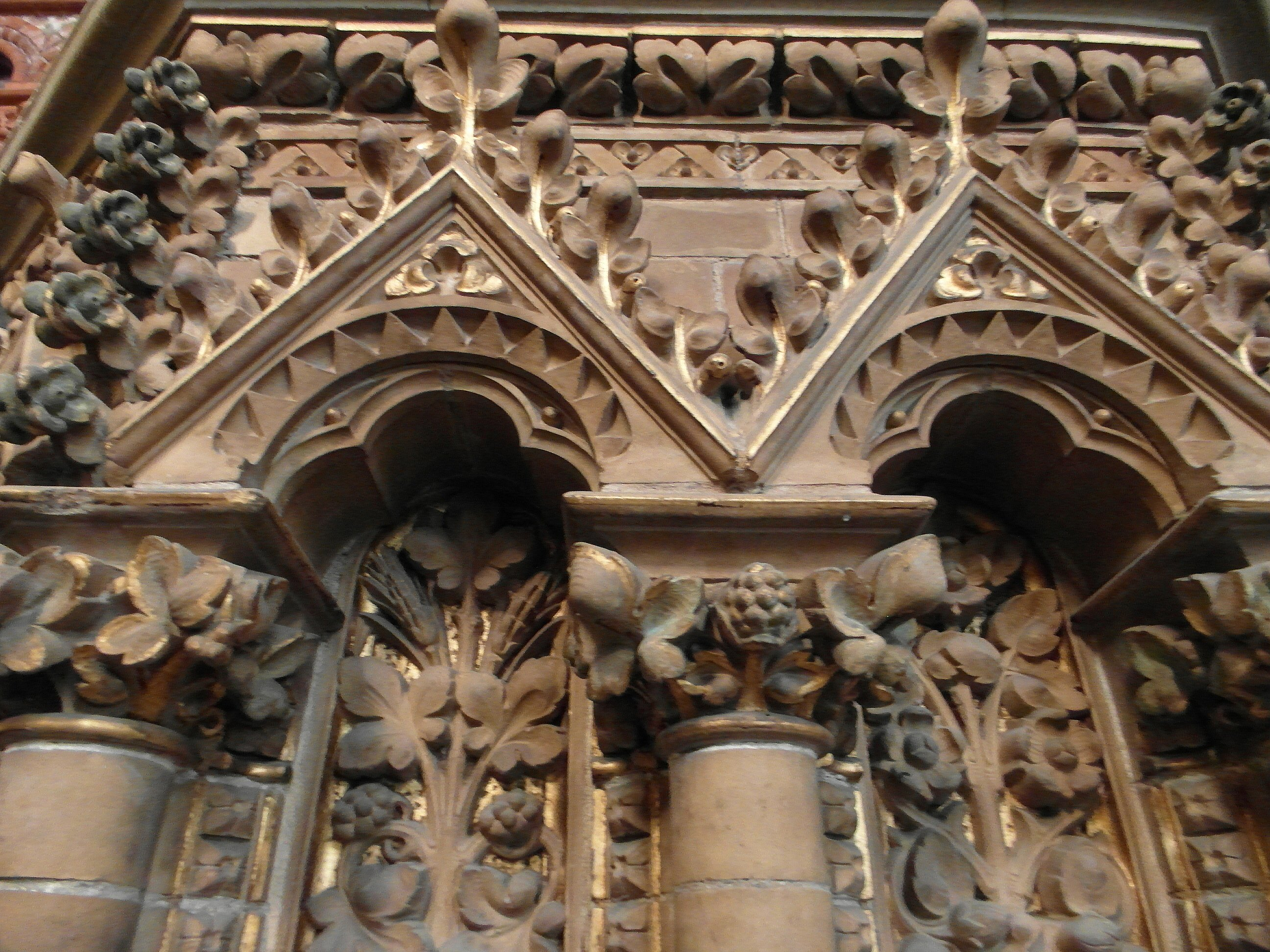 Details im Stile der Backsteingotik